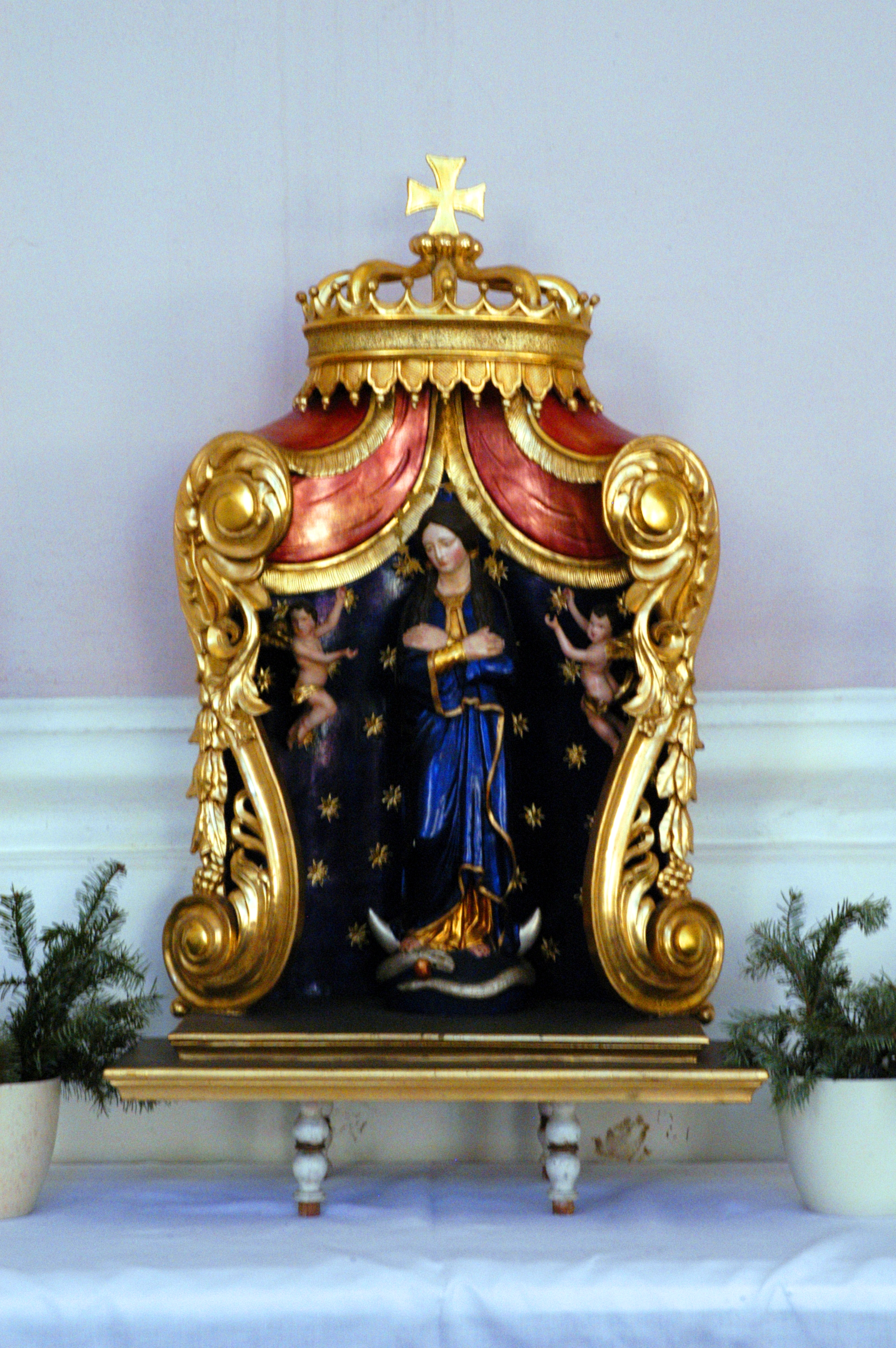 katholische Pfarrkirche heiliger Ulrich